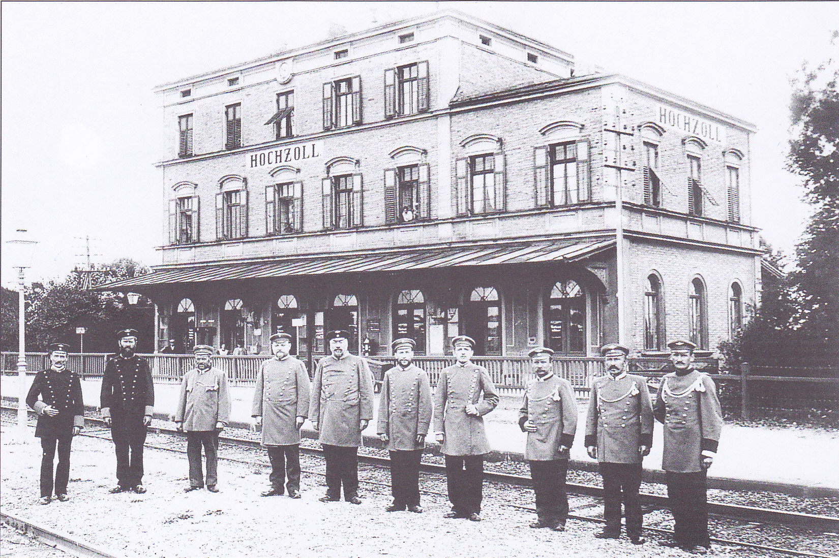 Empfangsgebäude des Bahnhofs Augsburg-Hochzoll von der Gleisseite mit Bahnhofspersonal